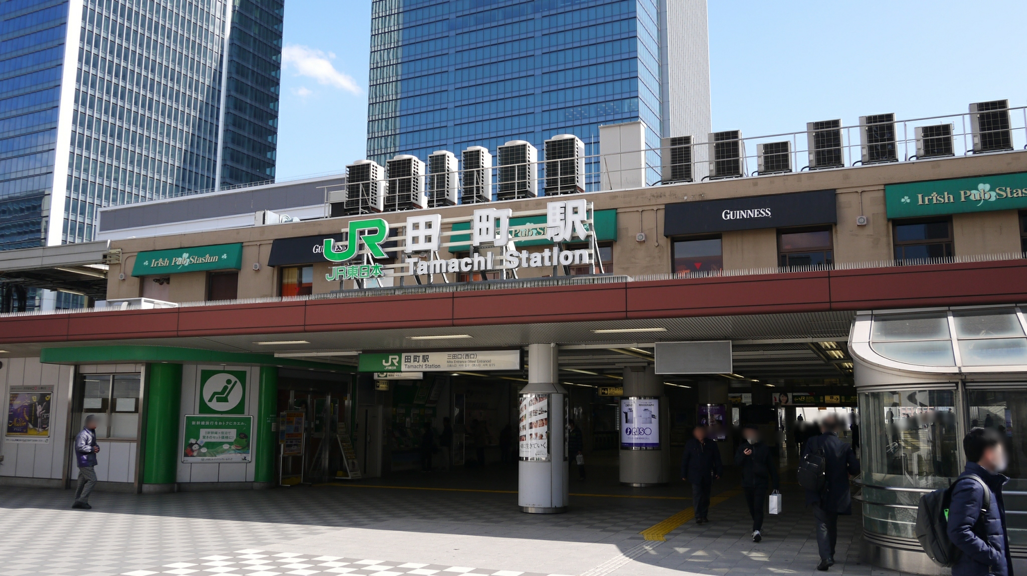 田町駅入口